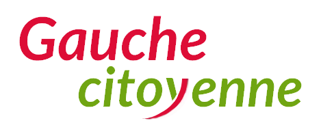 Reproduction du logo de la Gauche citoyenne du Val de Marne